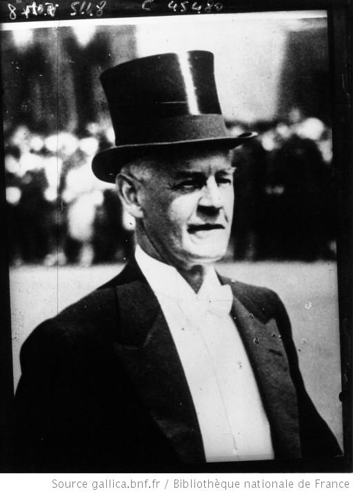 John Galsworthy, premio Nobel de literatura en 1932.